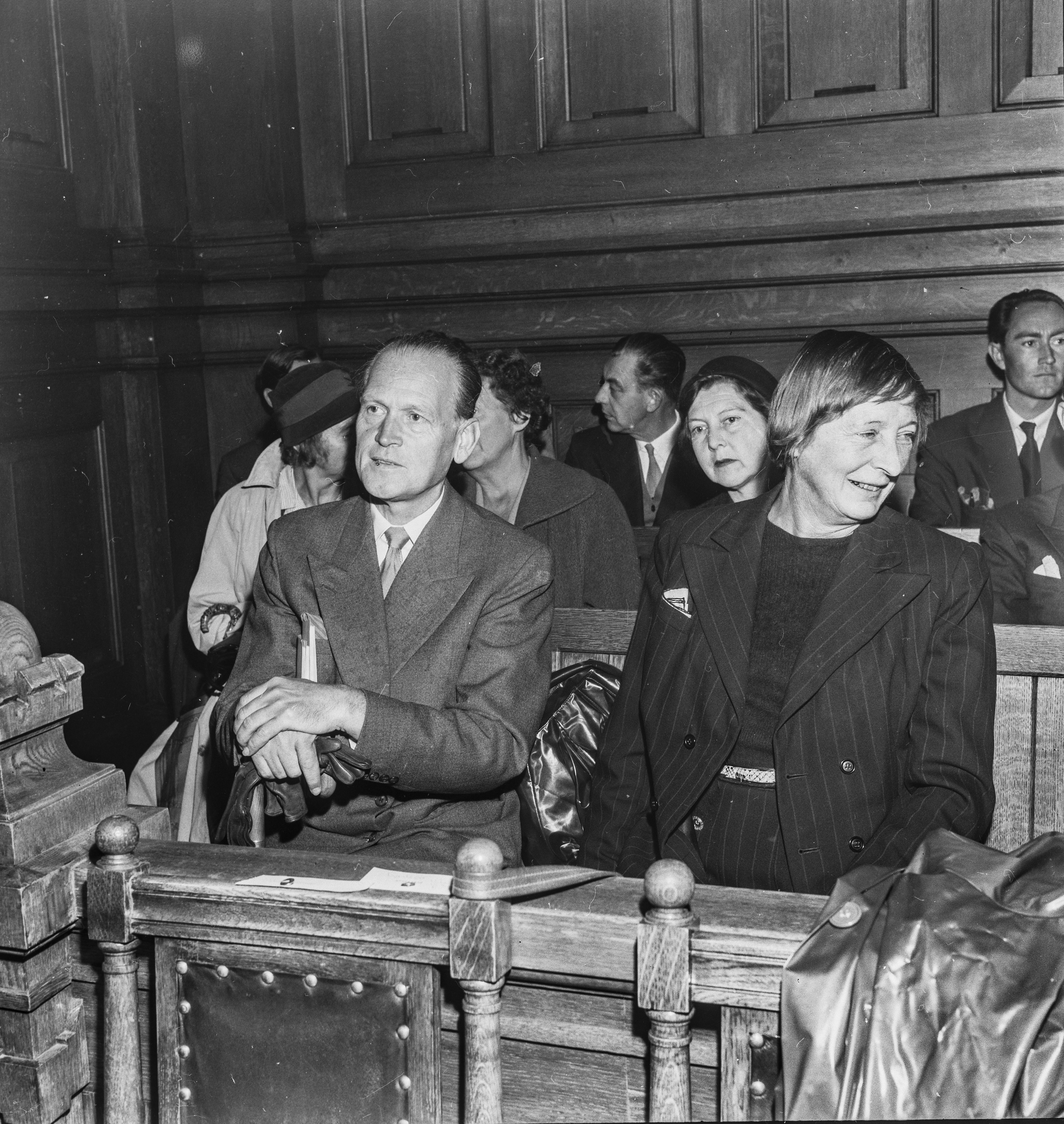 Bildet er hentet fra Arkivverket. Dommen i Høyesterett 1958 Arkivinstitusjon : Riksarkivet Arkivnavn : Billedbladet NÅ Sted : NORGE, Oslo, Oslo, Emneord: Rettsak, Litteratur, Forfattere Avbildet